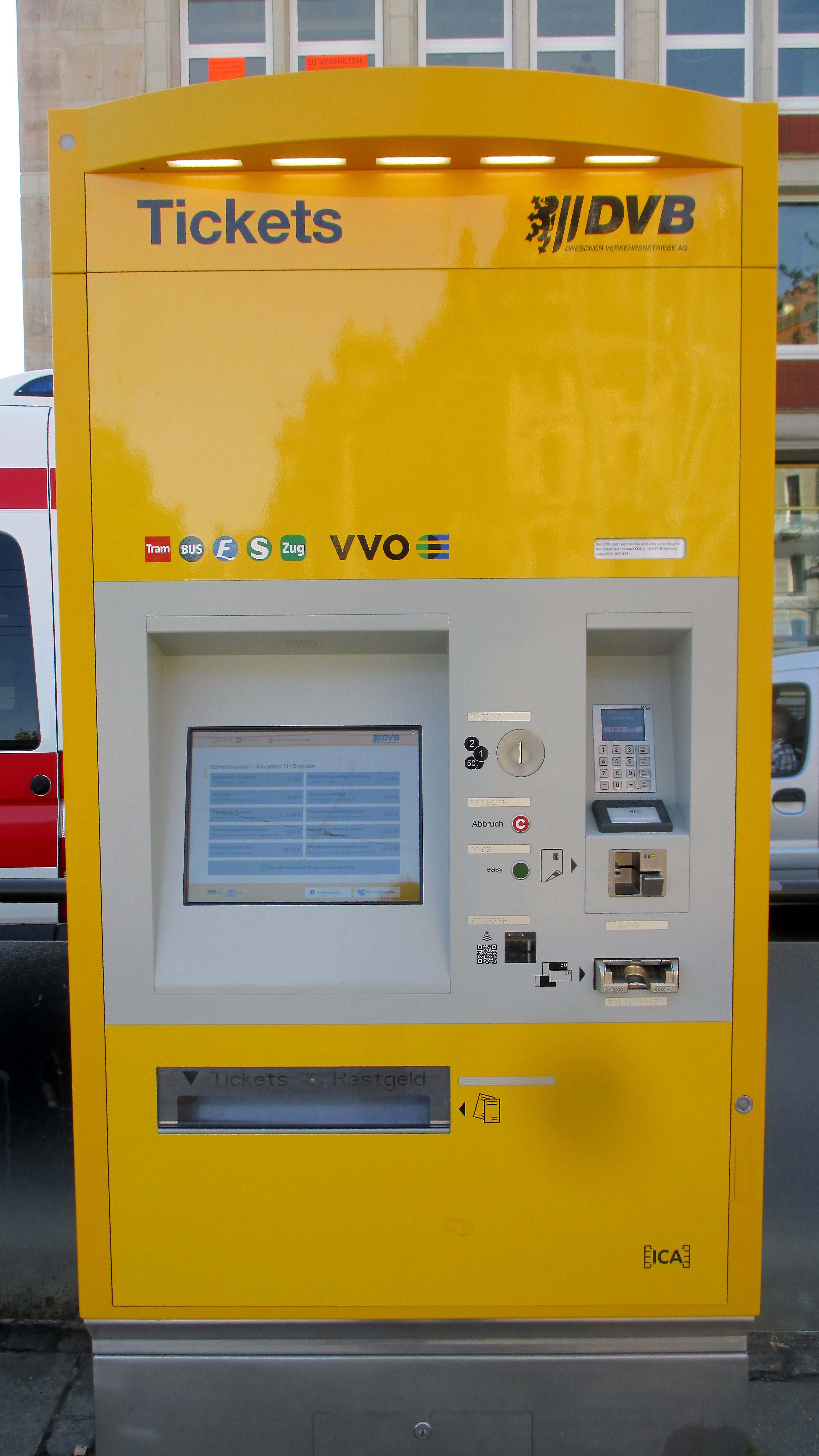 DVB Ticket Automat - Aufstellung 2018 - Dresden - Pirnaischer Platz